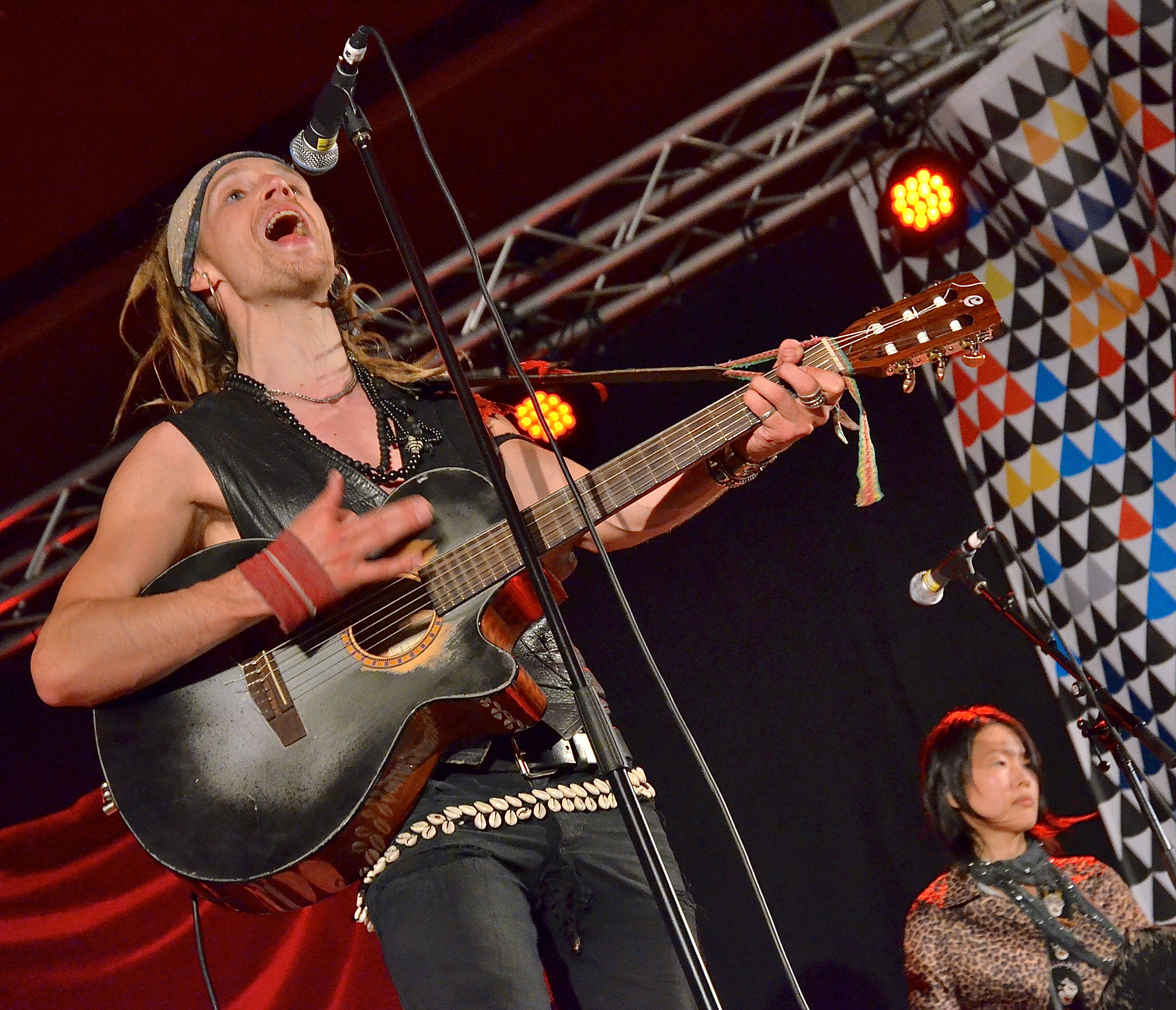 Crash Nomada under Stockholms Kulturfestival 2012.